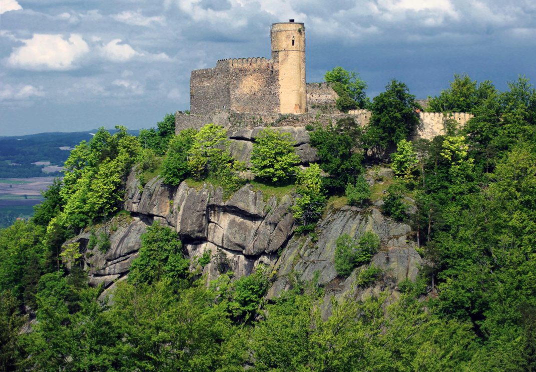 .Chojnik Castle